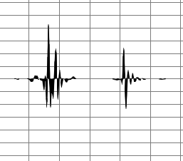 心音圖，取自自己的心音，1格為0.1秒